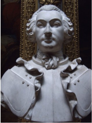 Pierre-François, marquis de Rougé, buste de la galerie des batailles du château de Versailles